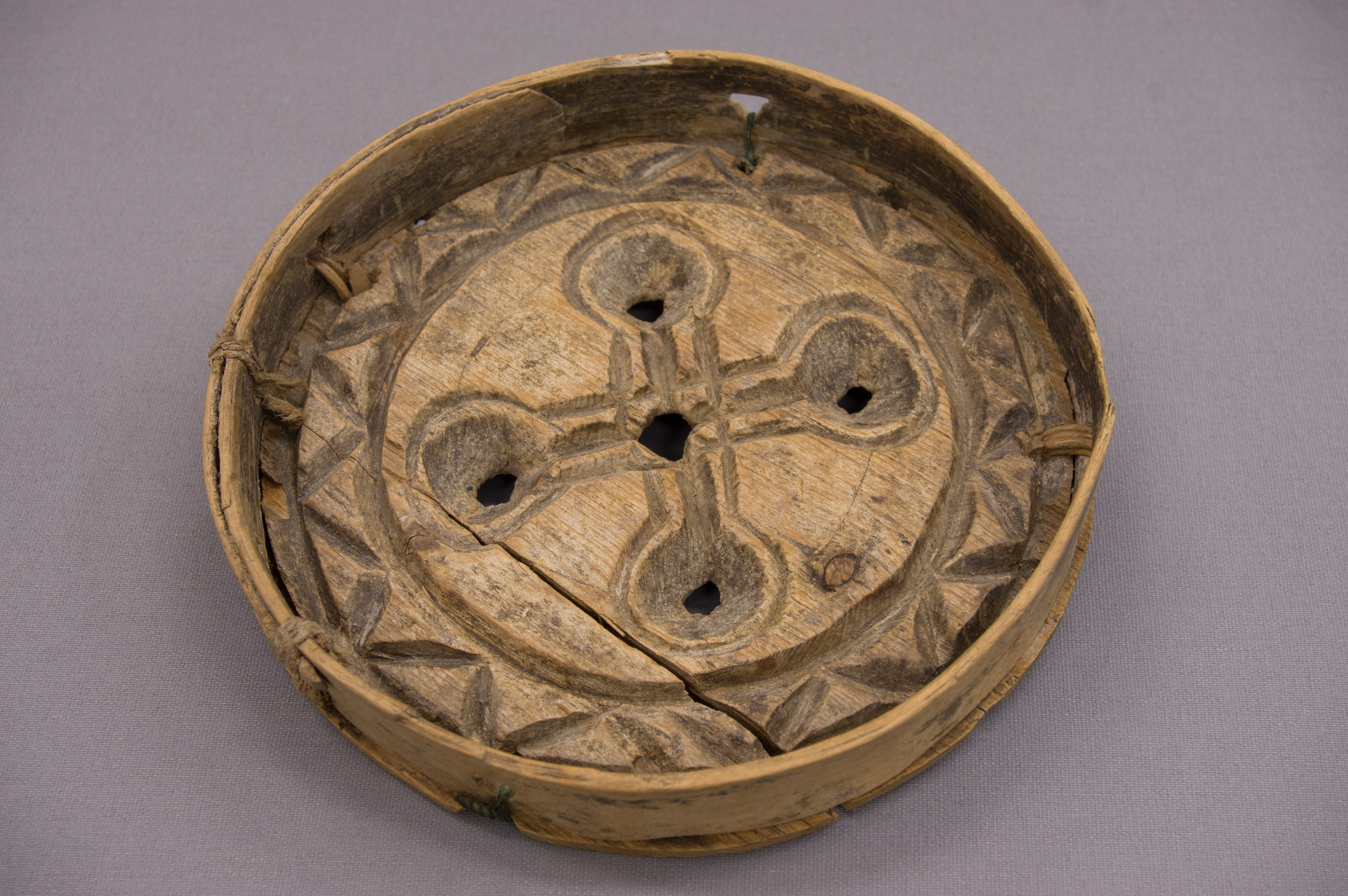 Käseform. Geographischer Bezug: Samen (Sámi, „Lappen“); Sápmi. Erwerbungsort: Finnland. Ferdinand Siemssen, Sammler. Höhe x Durchmesser: 3,2 x 16,5 cm, Holz, Spanholz. Datiert: 1818. Aus einer runden geschnitzten hölzernen Grundplatte. Als Rand ist Spanholz mit Holzbast angenäht. Museum Europäischer Kulturen, Staatliche Museen zu Berlin, Identifikations-Nr. II C 997.